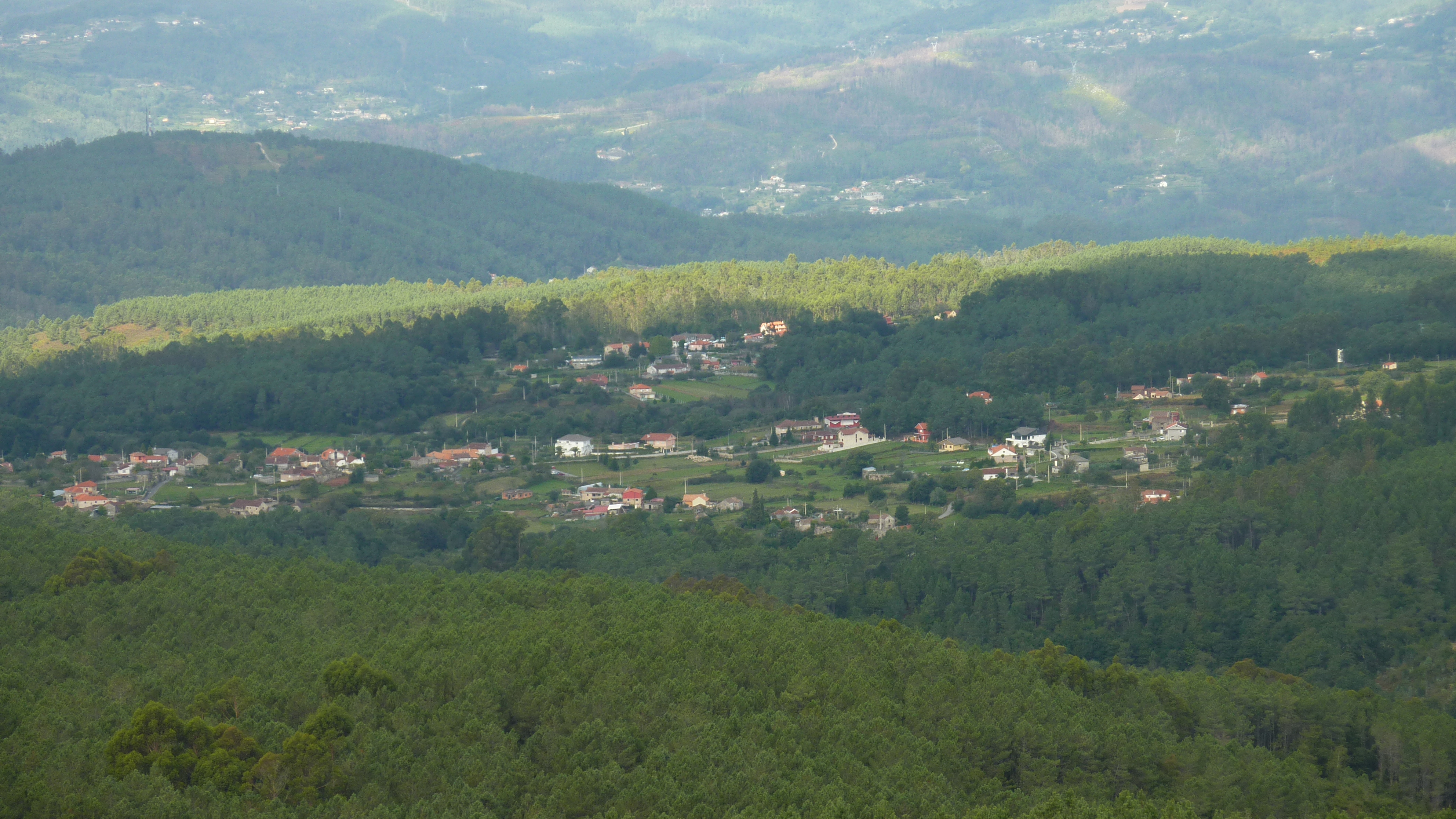 Parroquia: Paraños Ayuntamiento: CoveloGalego: Parroquia: Paraños Concello: Covelo